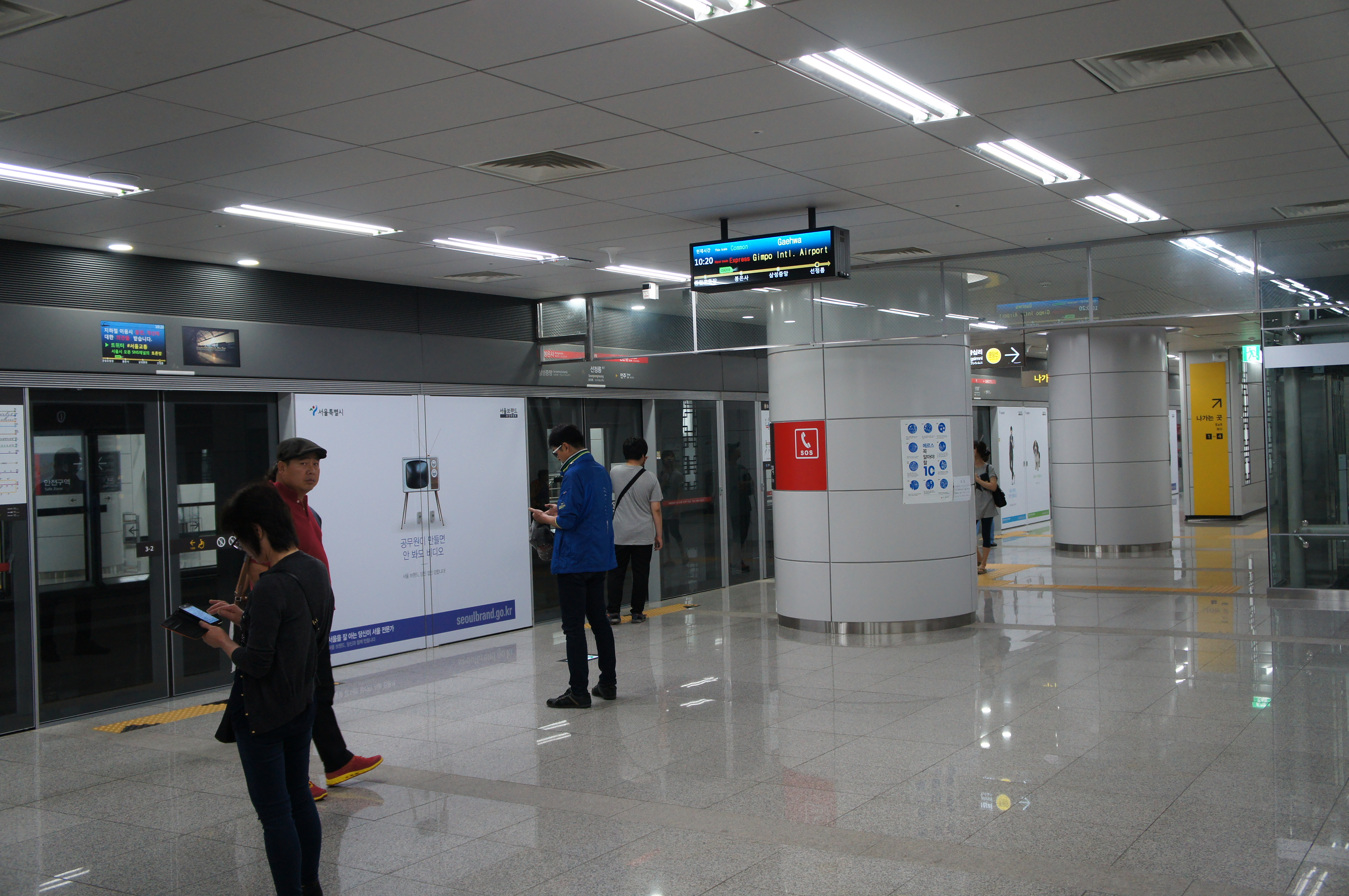 9호선 선정릉역 승강장